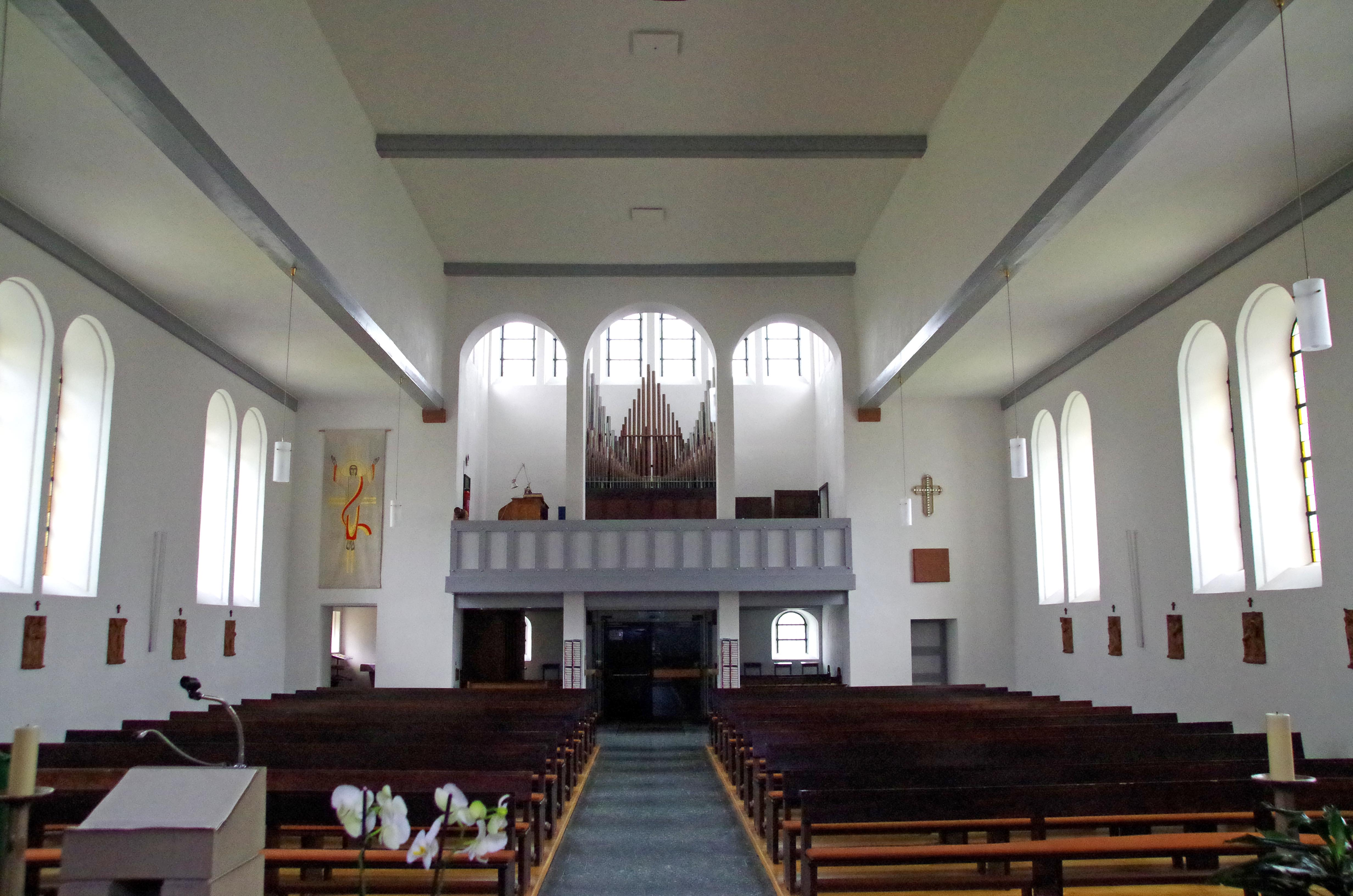 St. Barbara (Rescheid), Blick durchs Mittelschiff zur Orgelempore